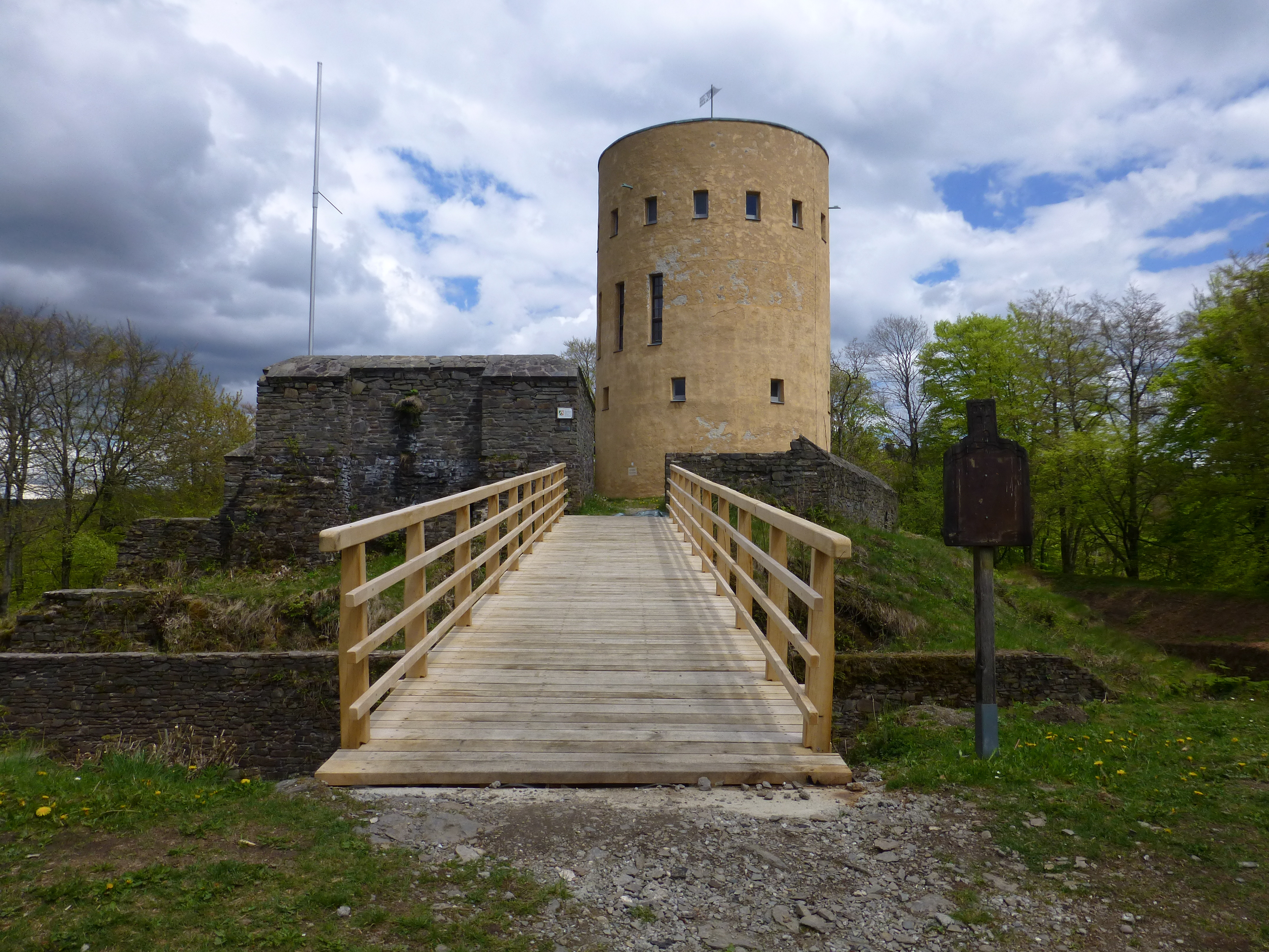 Ginsburg; Blick über die Holzbrücke zum Hauptturm der Burgruine